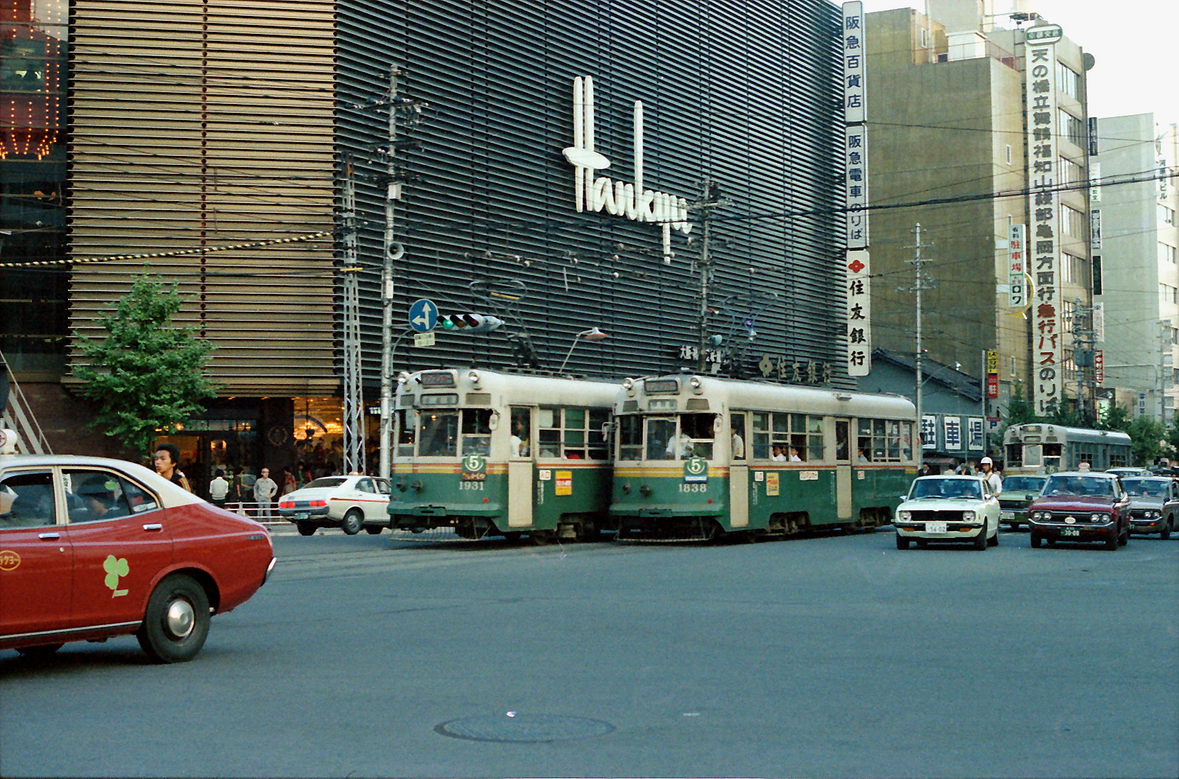 四条河原町交差点 阪急百貨店（現在の京都マルイ店） 京都市下京区